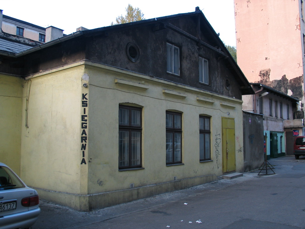 Była synagoga przy Piotrkowskiej 46 w Łodzi